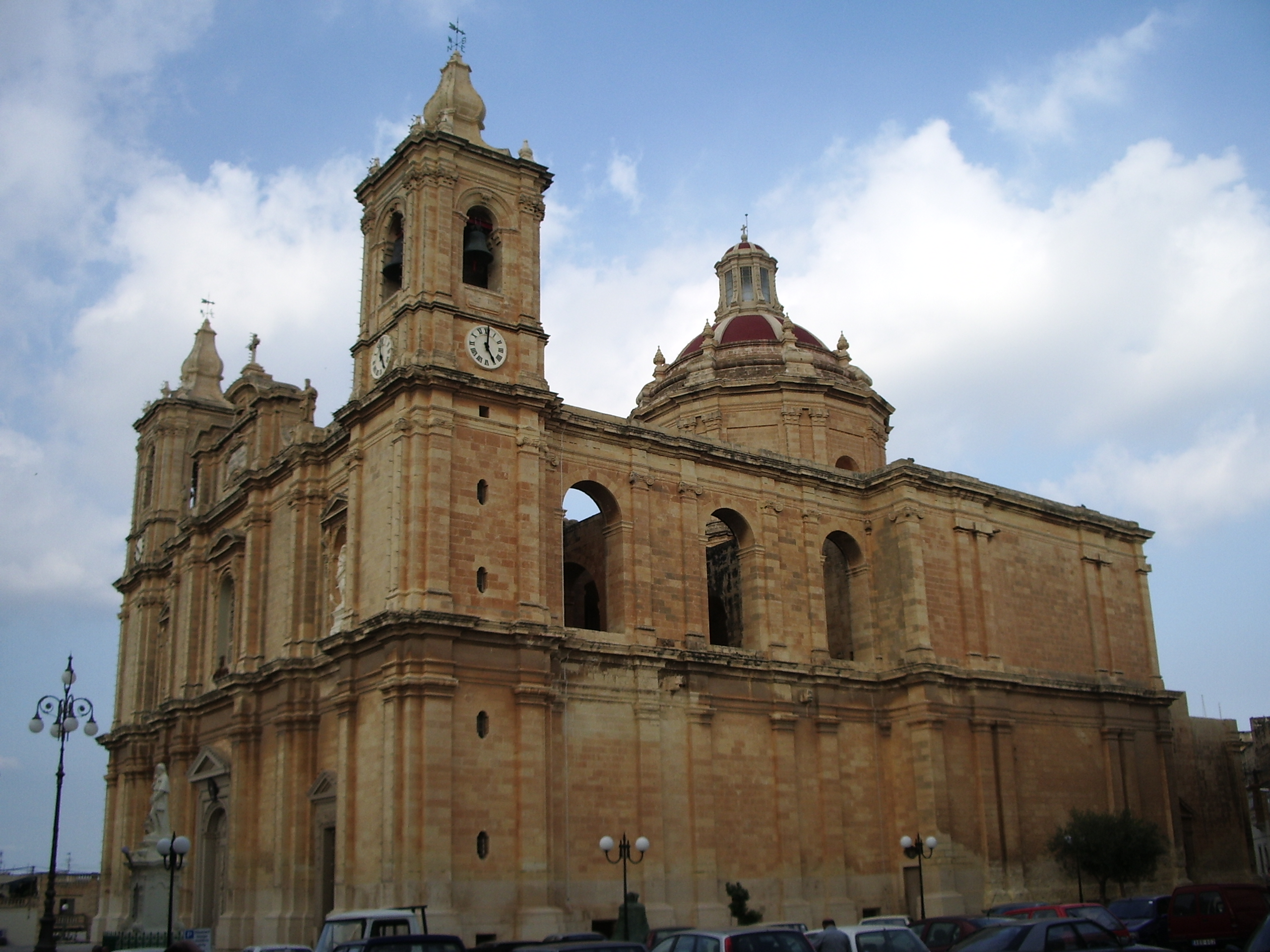 Cattedrale di Żejtun